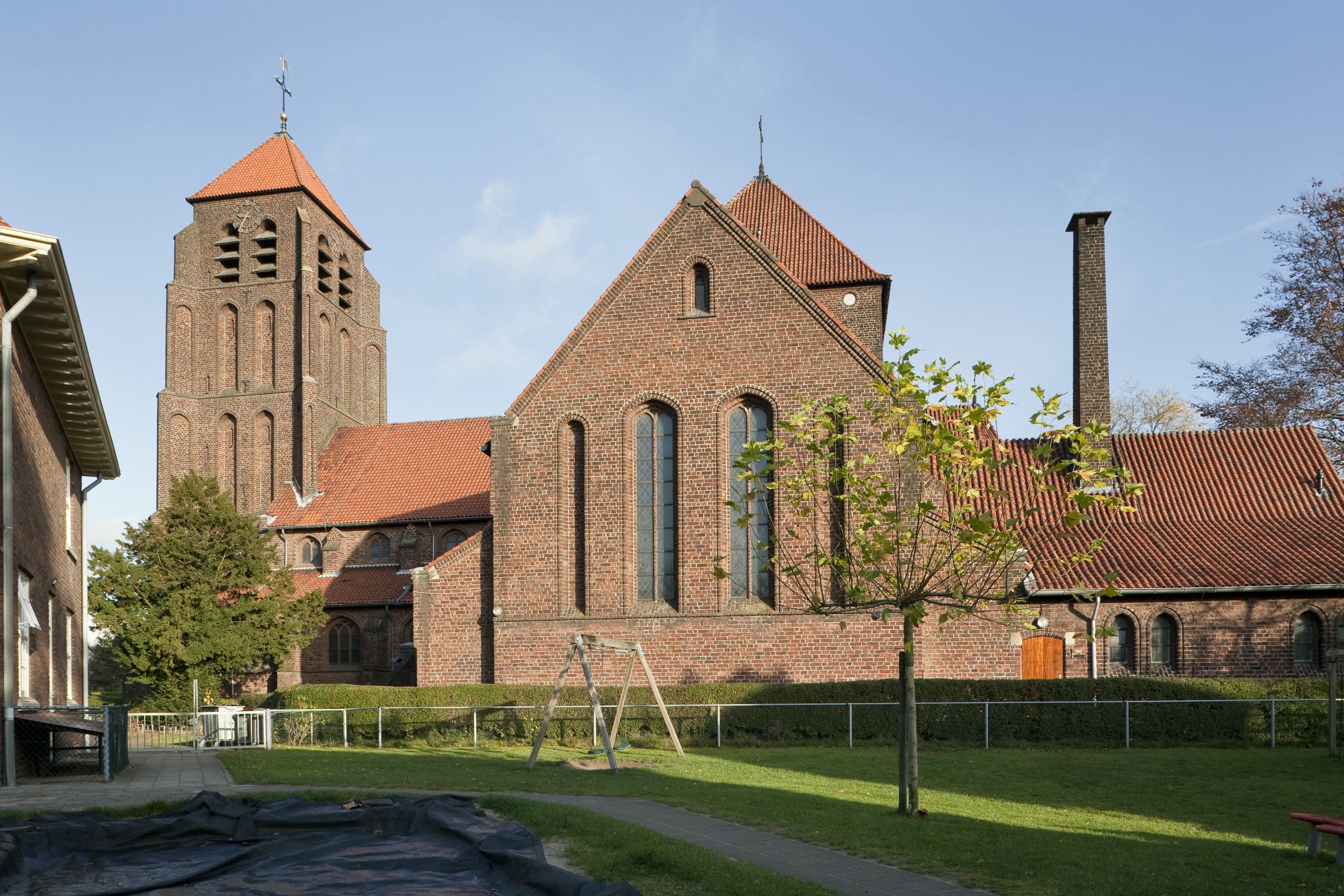 O.L. Vrouw ten Hemelopneming: Overzicht linkergedeelte van de zuidgevel van de kerk met de kerktoren